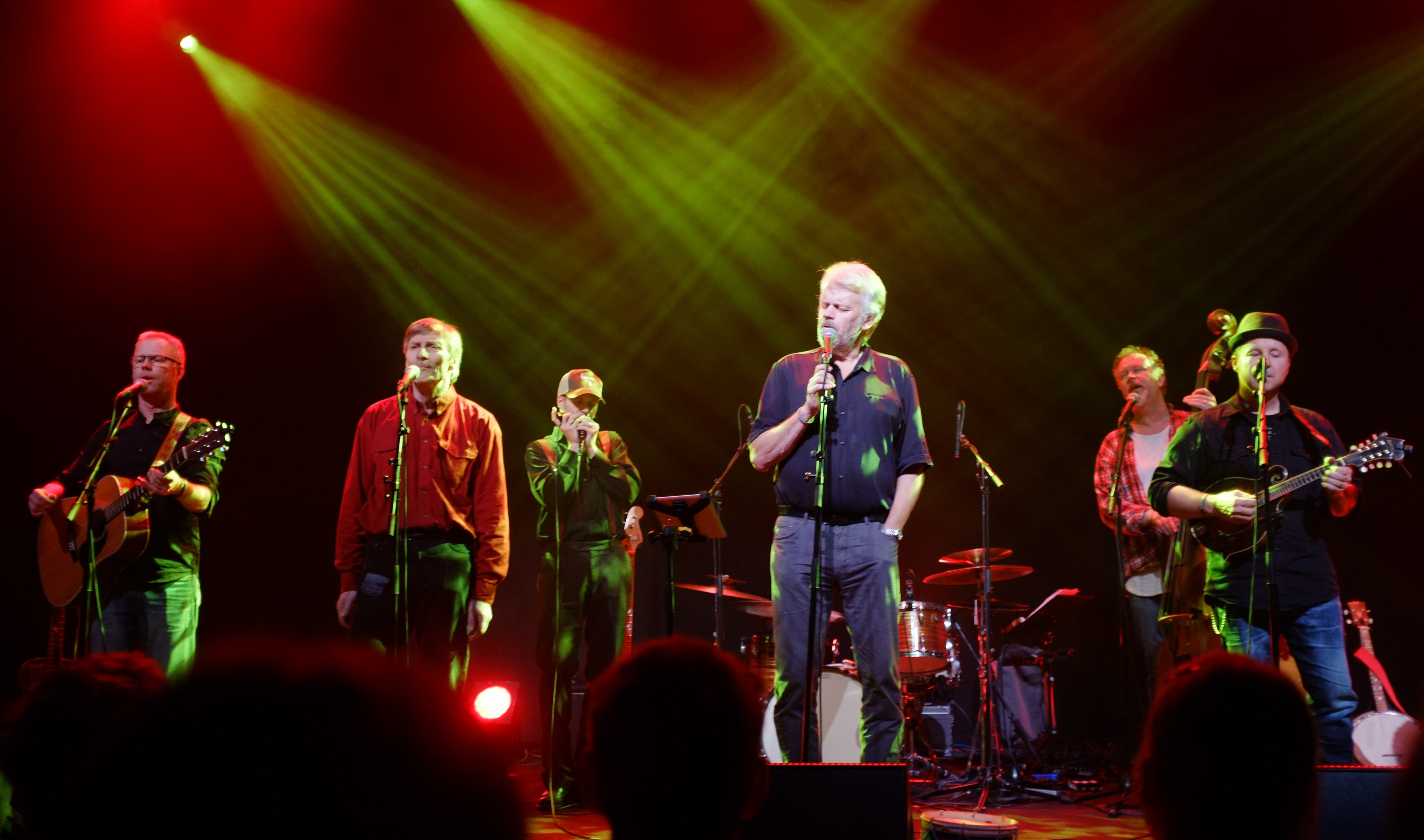 Euskefeurat Acusticum, Piteå